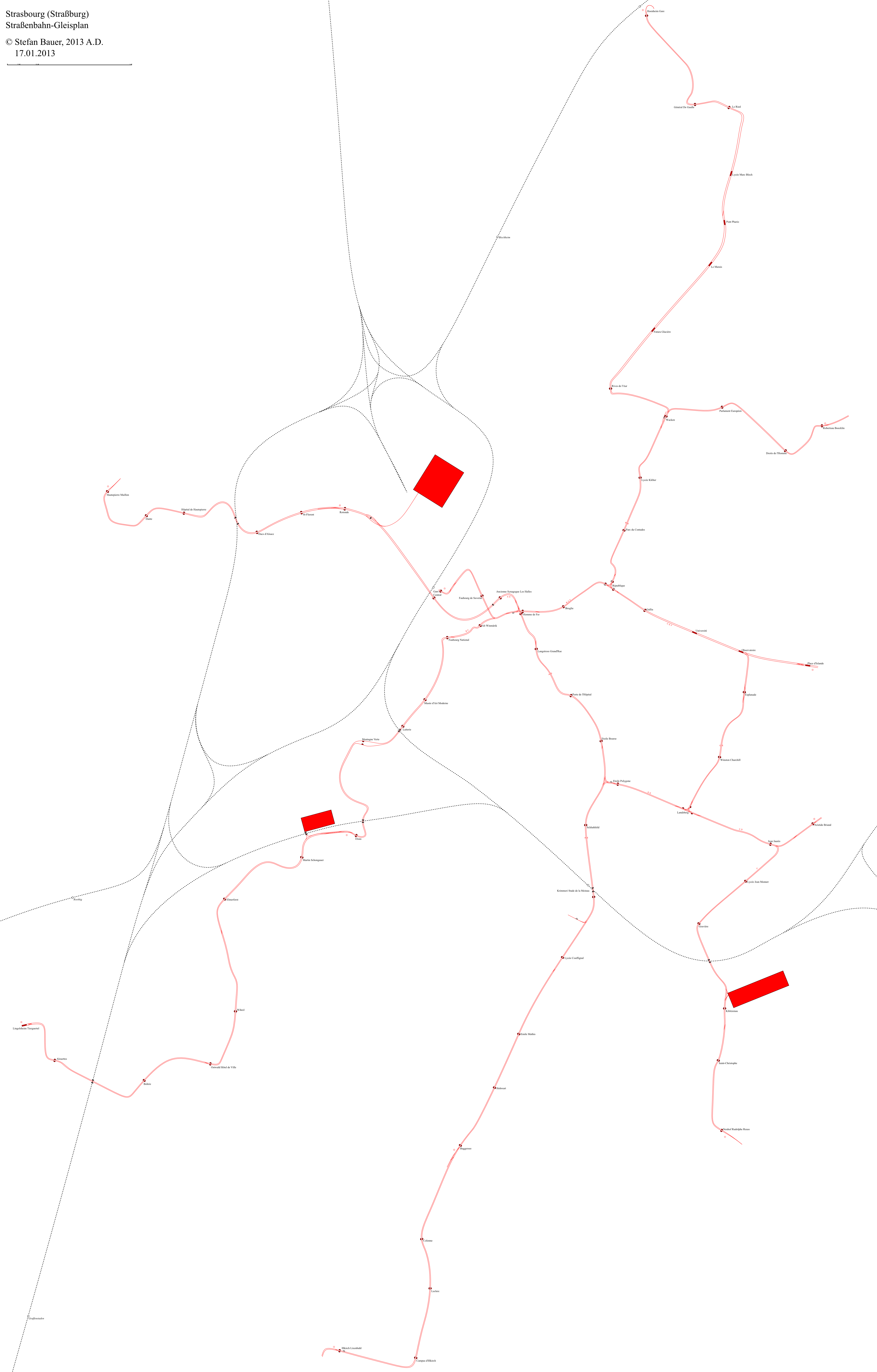 Plan des voies du réseau des tramways de Strasbourg 2013